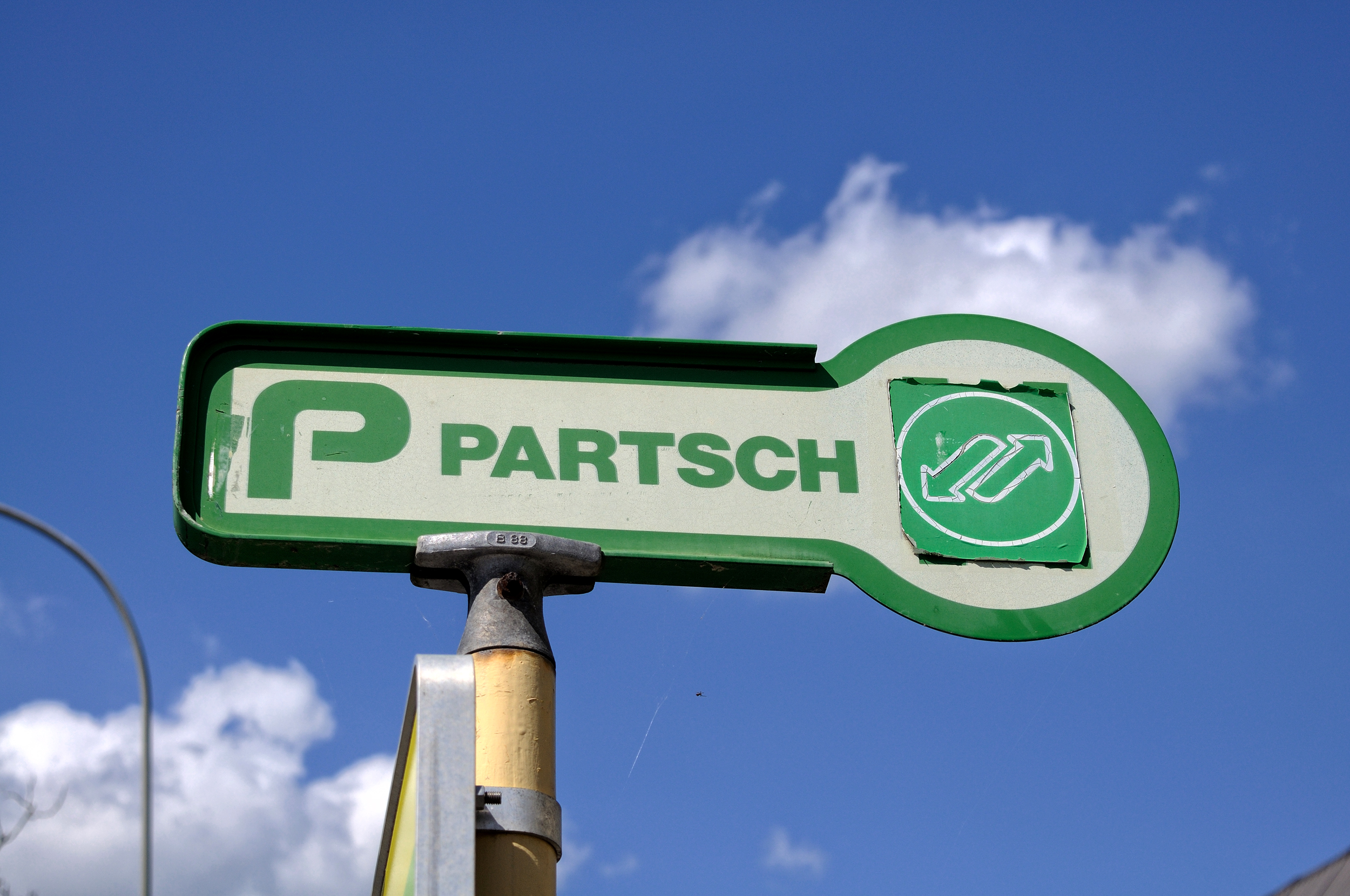 Haltestellenlöffel des Unternehmens Partsch mit dem alten VOR-Logo an der Hst. Teesdorf Bahnstraße